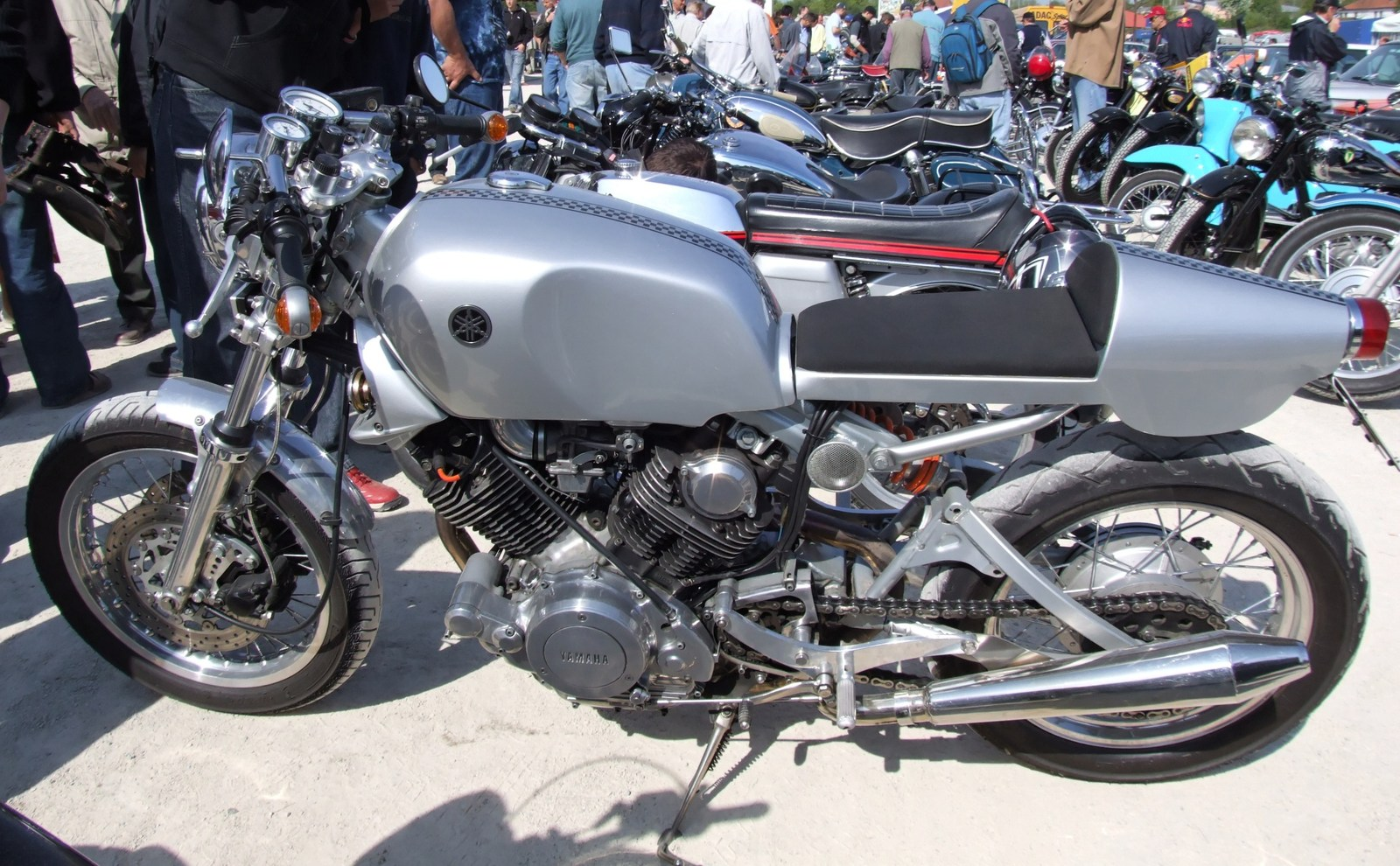 Quelle: selbst fotografiert, 04/2007 Fotograf: Späth Chr.